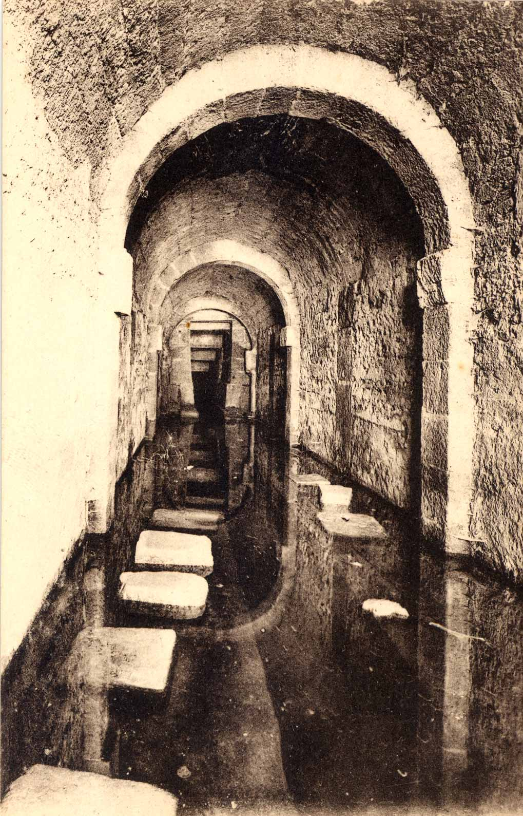 Carthage, La galerie intérieure de la fontaine aux 1000 amphores